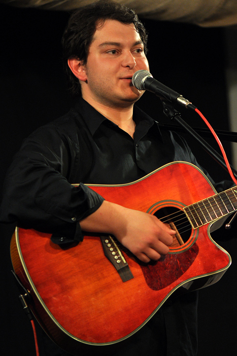 Adam Katona 22.5.2010 na koncertě v M-klubu Hustopečích.